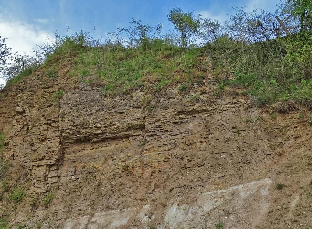 Felswand im Freigerichter Zechsteindolomit